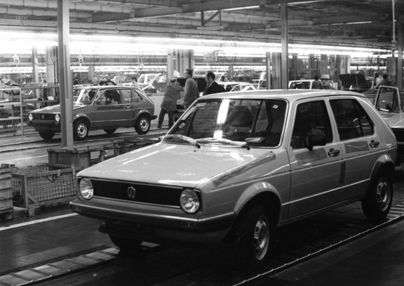 Volkswagenwerk Wolfsburg Fertigung des Golf